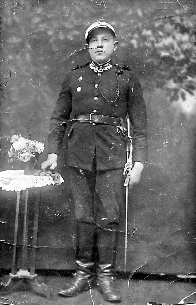 ユゼフ・コワルスキー大尉（1900年2月2日 - 2013年12月7日）